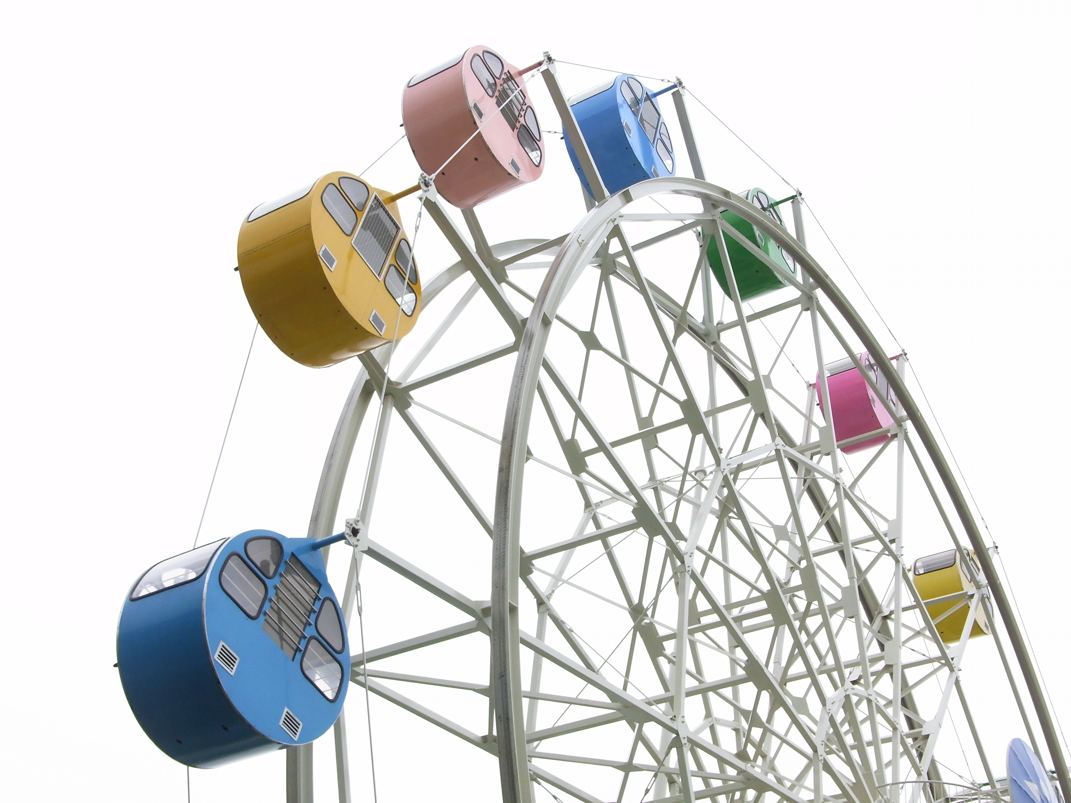 久留米市鳥類センター 観覧車。福岡県久留米市。